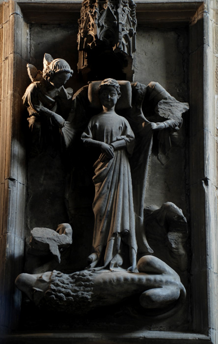 Lápida de una infanta,(Leonor? hija de Carlo II) siglo XIV